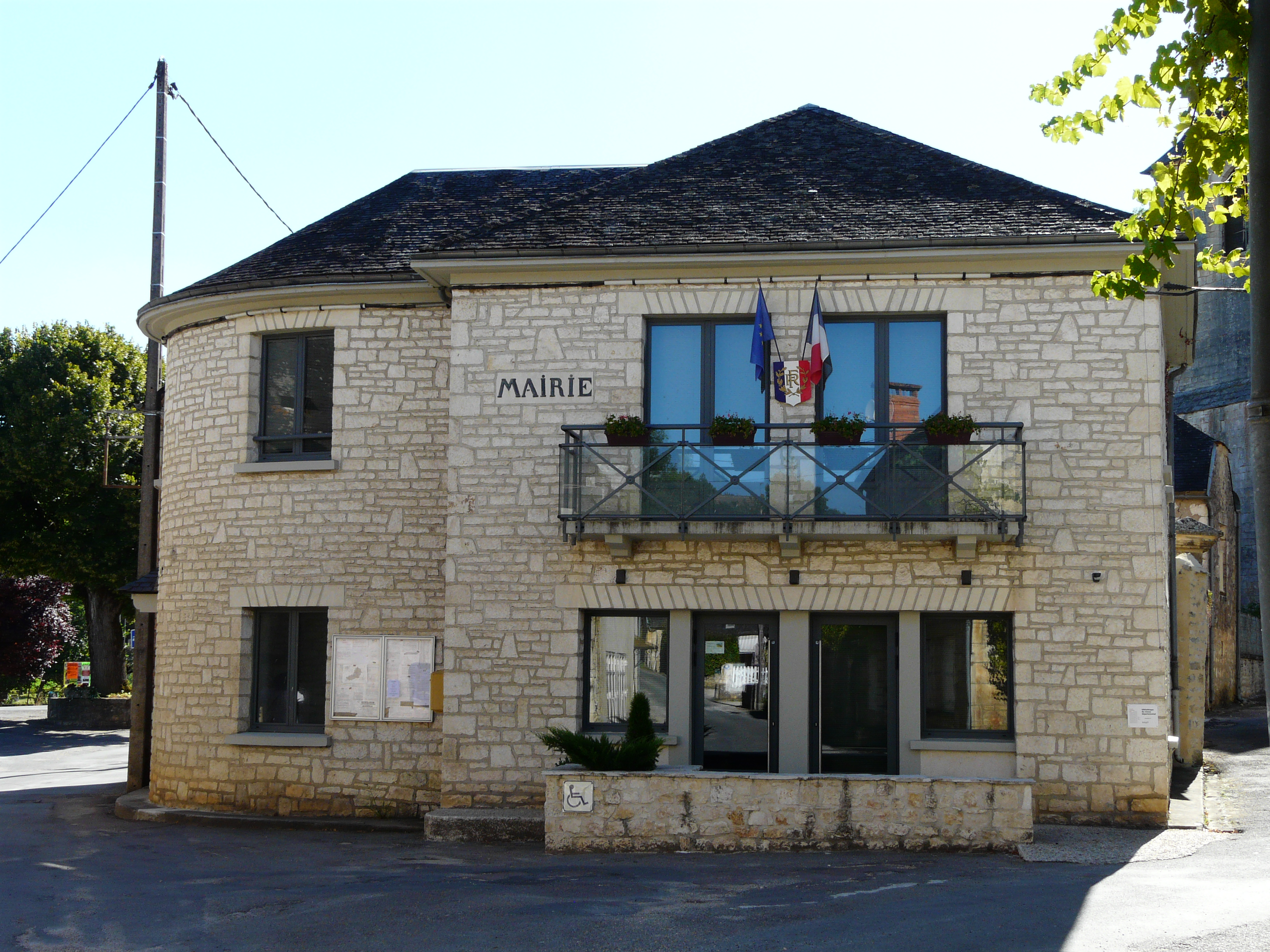 La mairie de Borrèze, Dordogne, France.